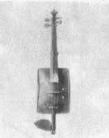 Latín o violín de lata. Instrumento informal de Les Luthiers